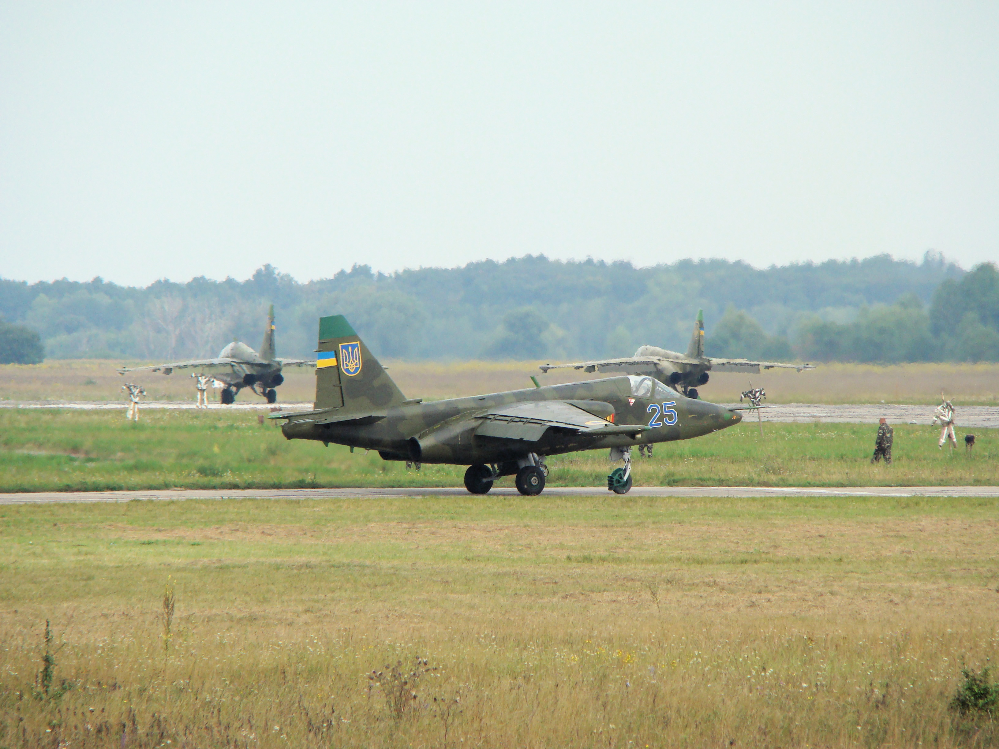 Су-25 Украинских Воздушных сил